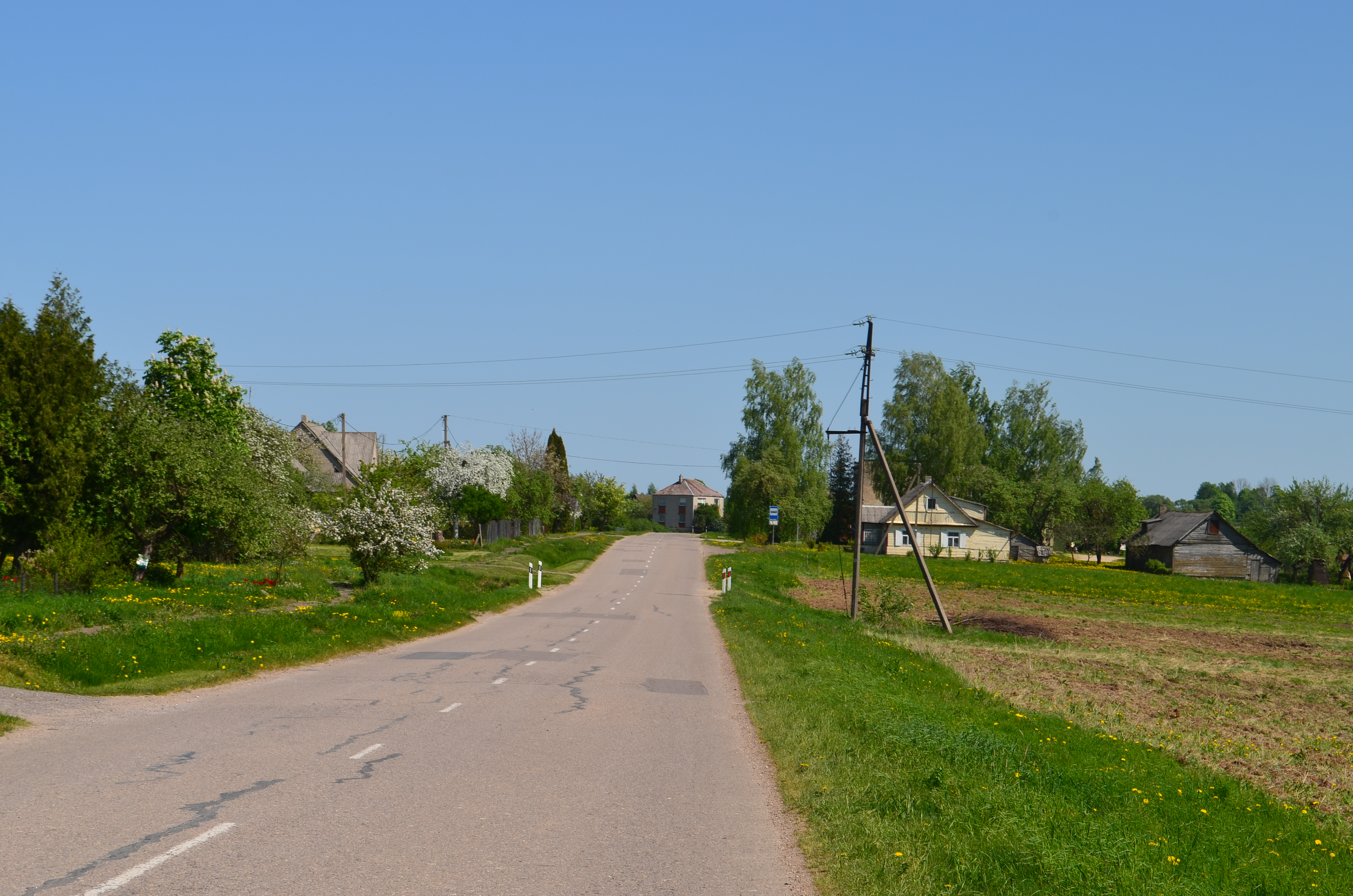 Kabošiai, Kavarsko sen., Anykščių raj.